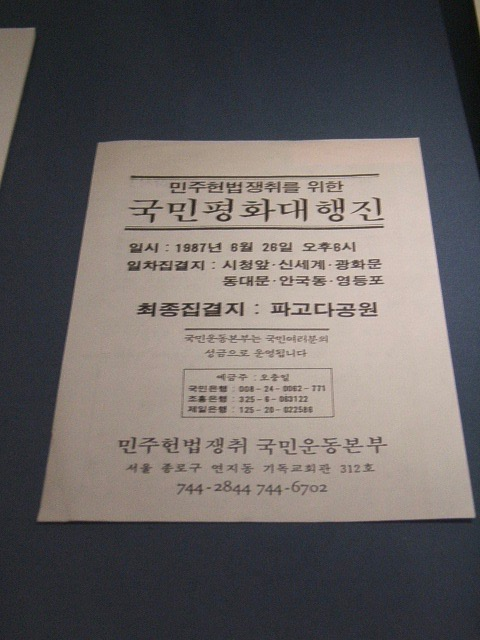 대한민국역사박물관에 전시된 1987년 6월 26일 국민평화대행진 전단